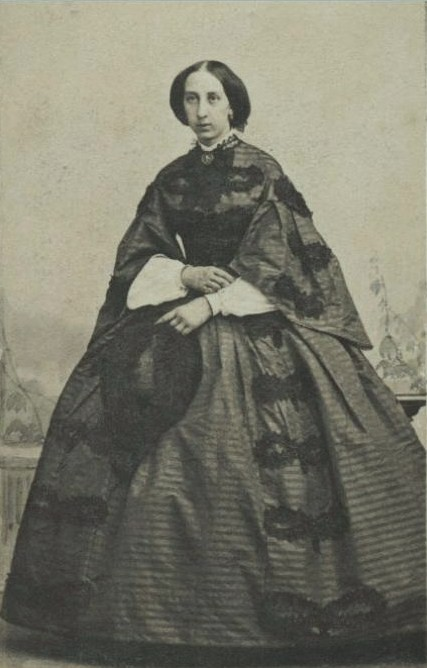 Наталья Афанасьевна Шереметева, ур. Столыпина (1834—1905)